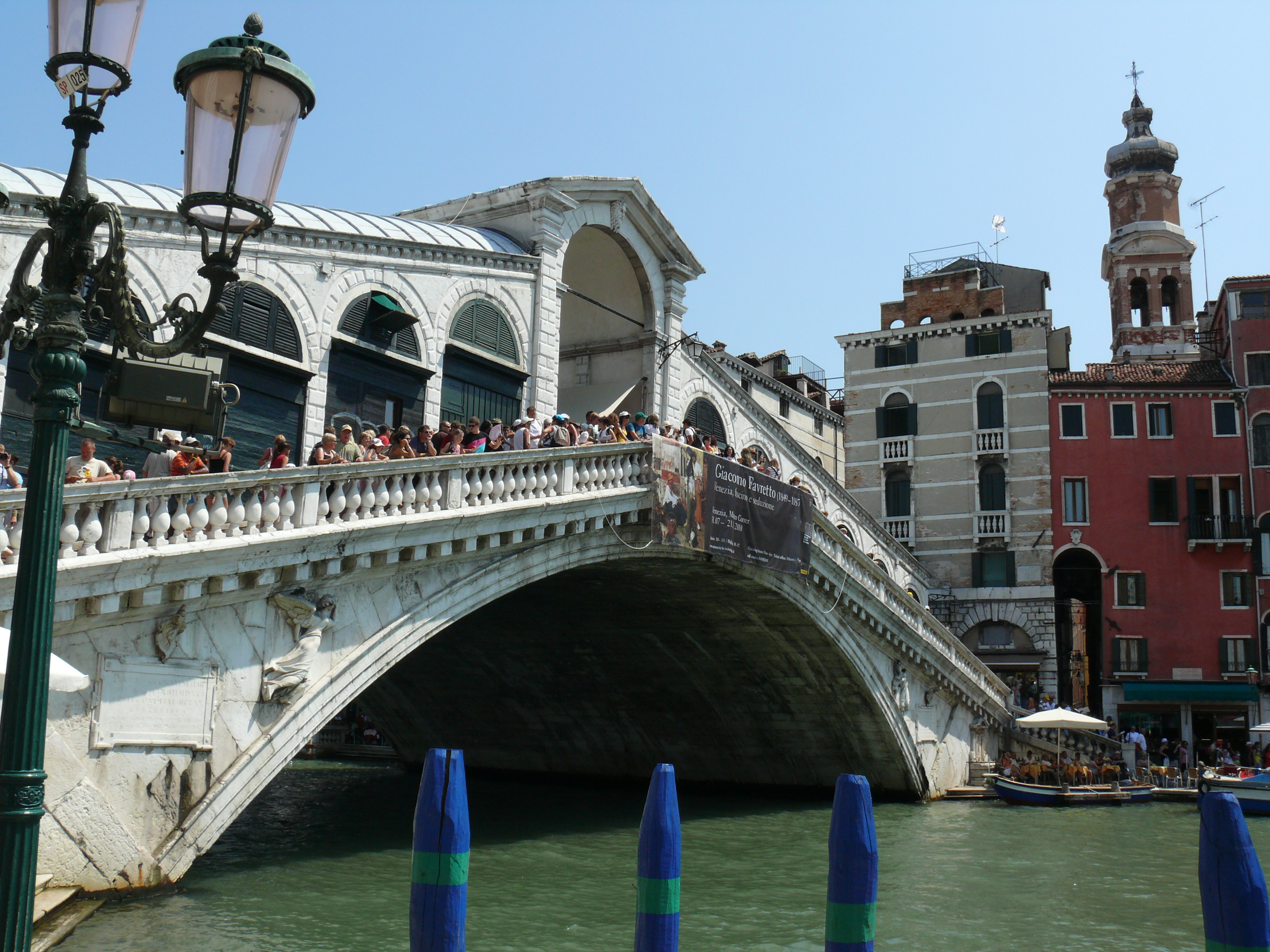 Photos d'Italie et de Croatie Le pont Rialto